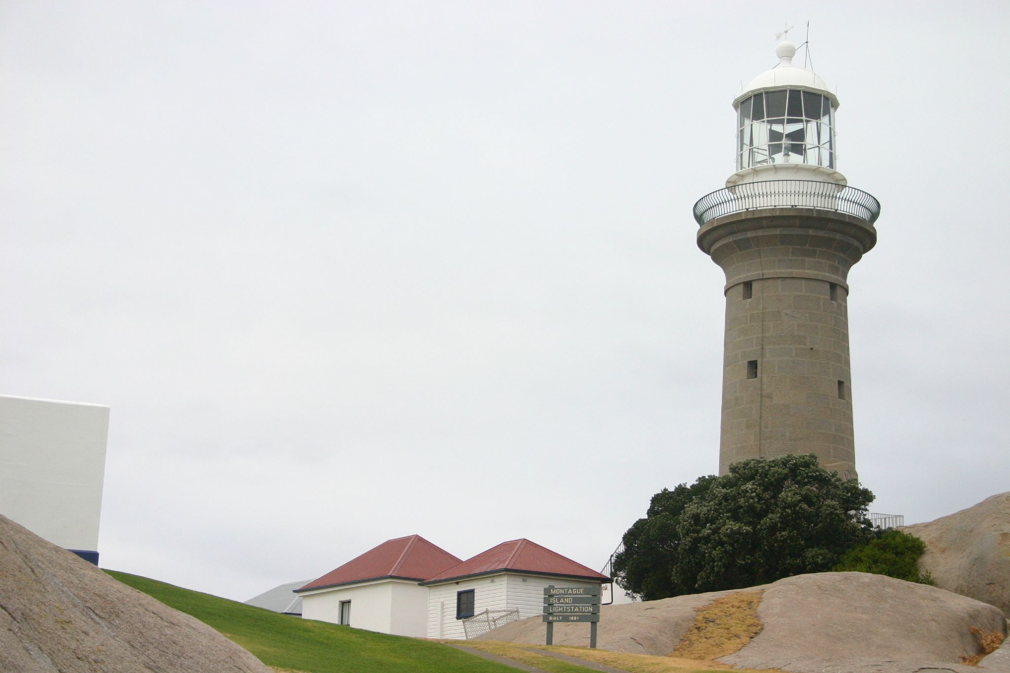 phare de l'île Montague; Australie